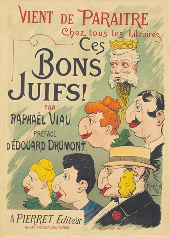 Affiche pour Ces bons juifs, un livre de Raphaël Viau.